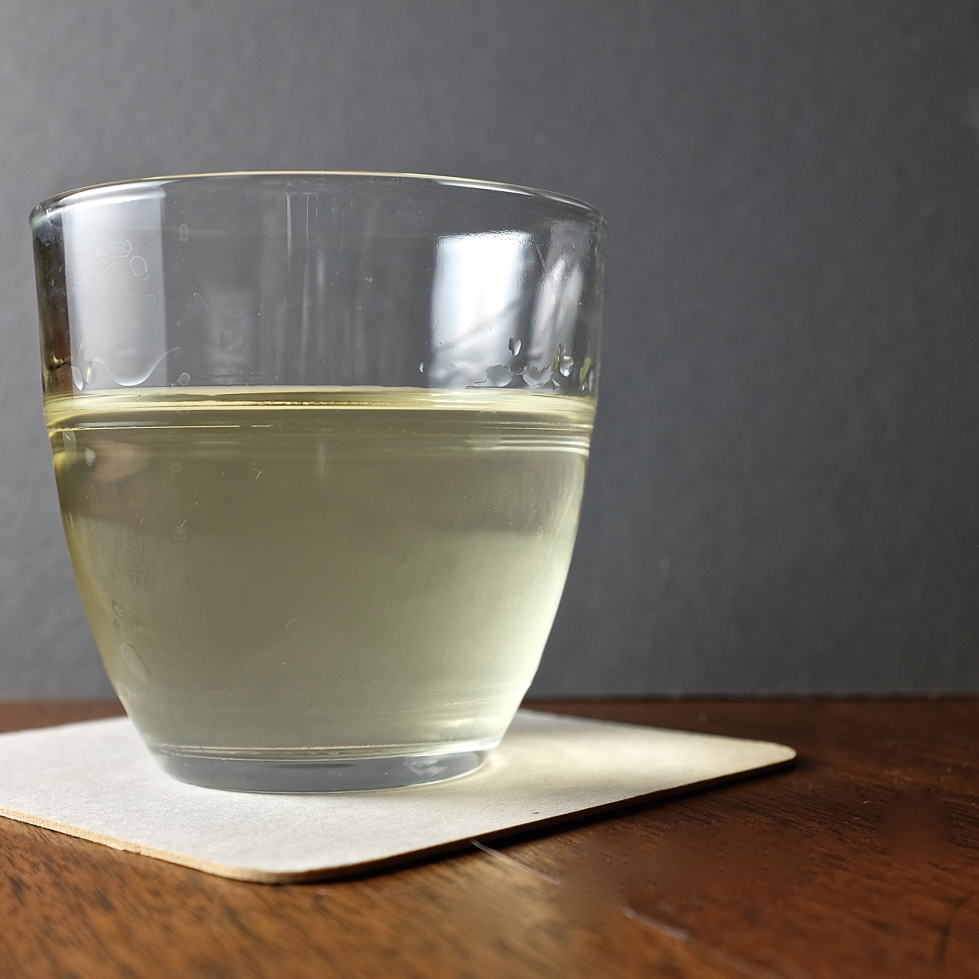 Glass Duralex Gigogne